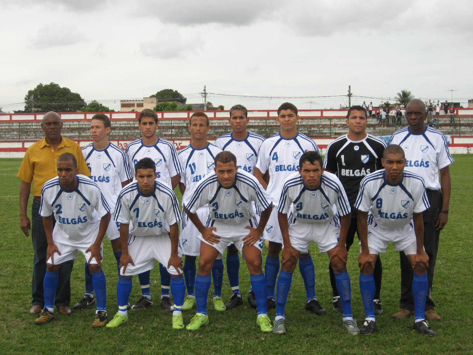 Equipe do Heliópolis AC perfilada.